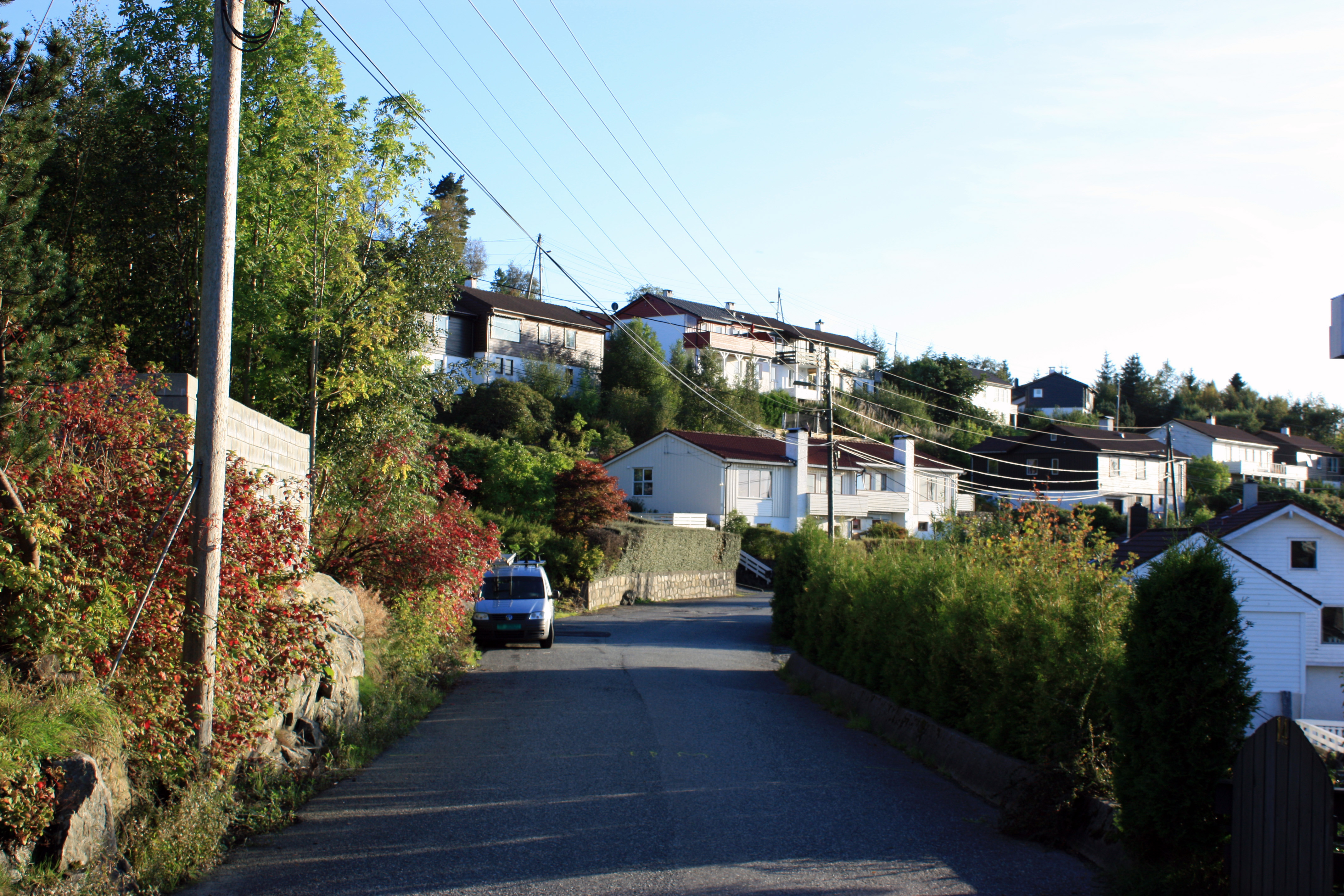 Nordlia, Fana, Bergen.